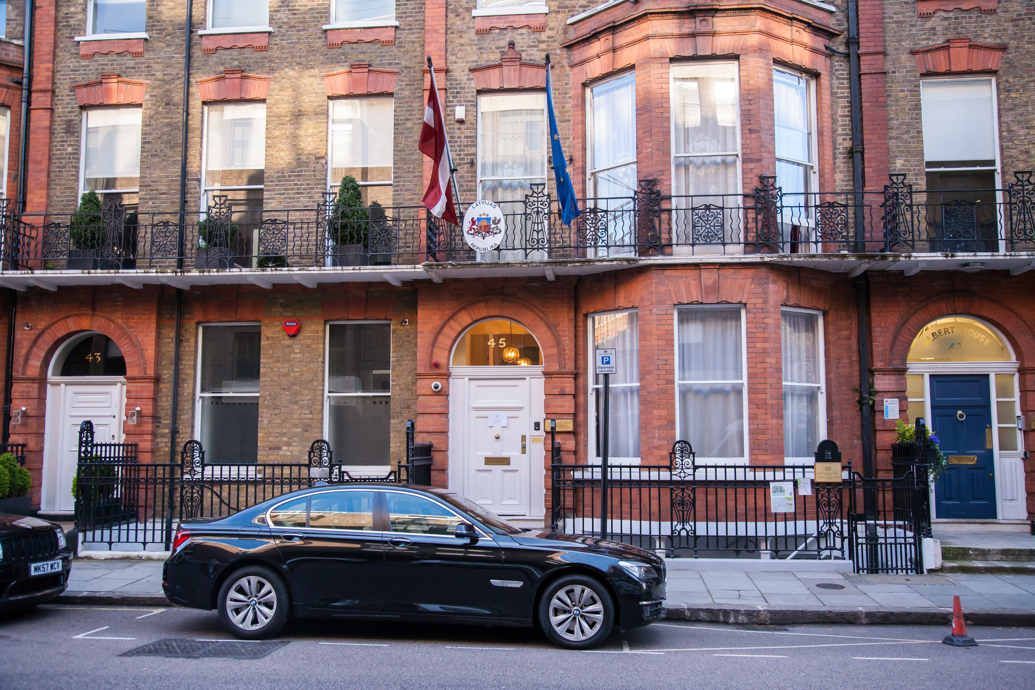 Latvijas vēstniecība Londonā, Lielbritānija